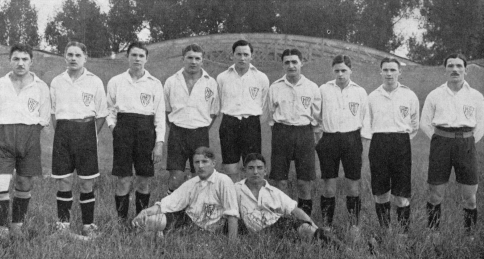 Mannschaft der HFG (Heilbronner Fußball-Gesellschaft von 1896) im Jahr 1913. Reprod. in 75 Jahre VfR Heilbronn, Heilbronn 1971, S. 15. Von links: König, Fritschle, Schwarz, K. Pfleiderer, Mauk, Schick, Muff, Heß, K. Rücker, vorne Ratgeber und A. Pfleiderer